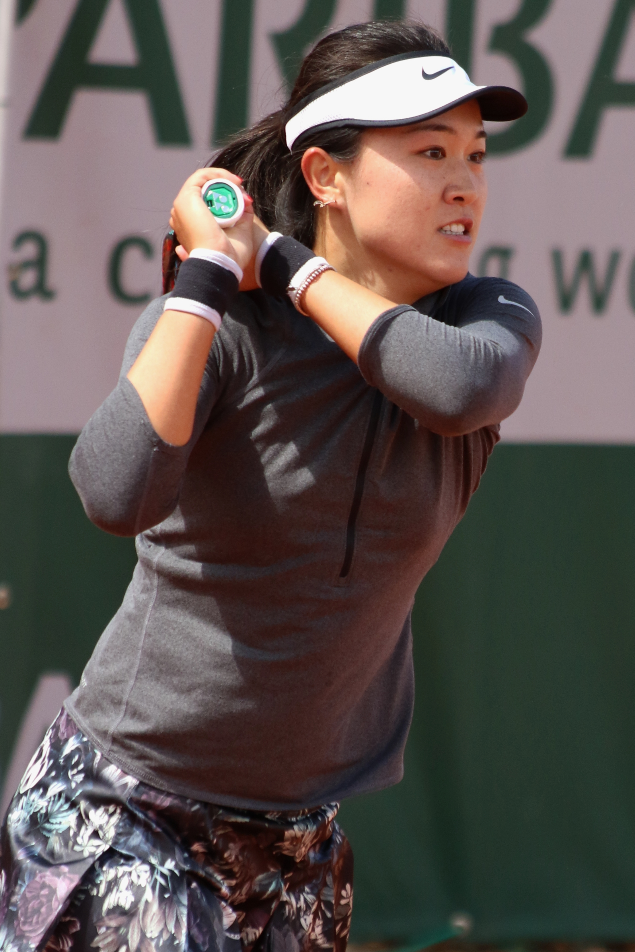 Zhu RG19 (12)